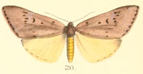 Adrepsa stilbioides Moore, 1879